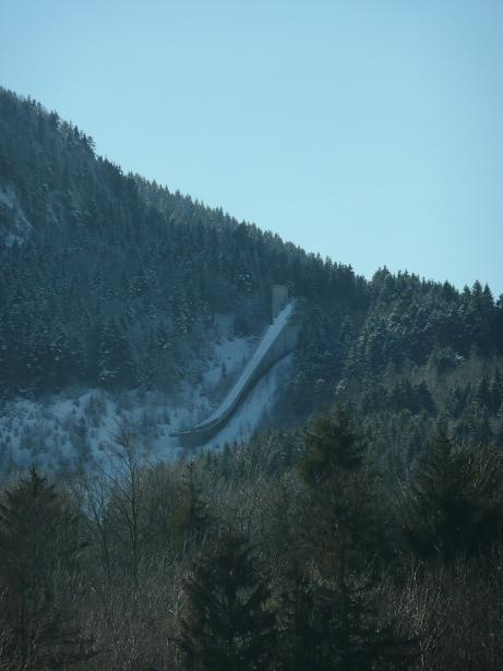 Le tremplin olympique de St-Nizier